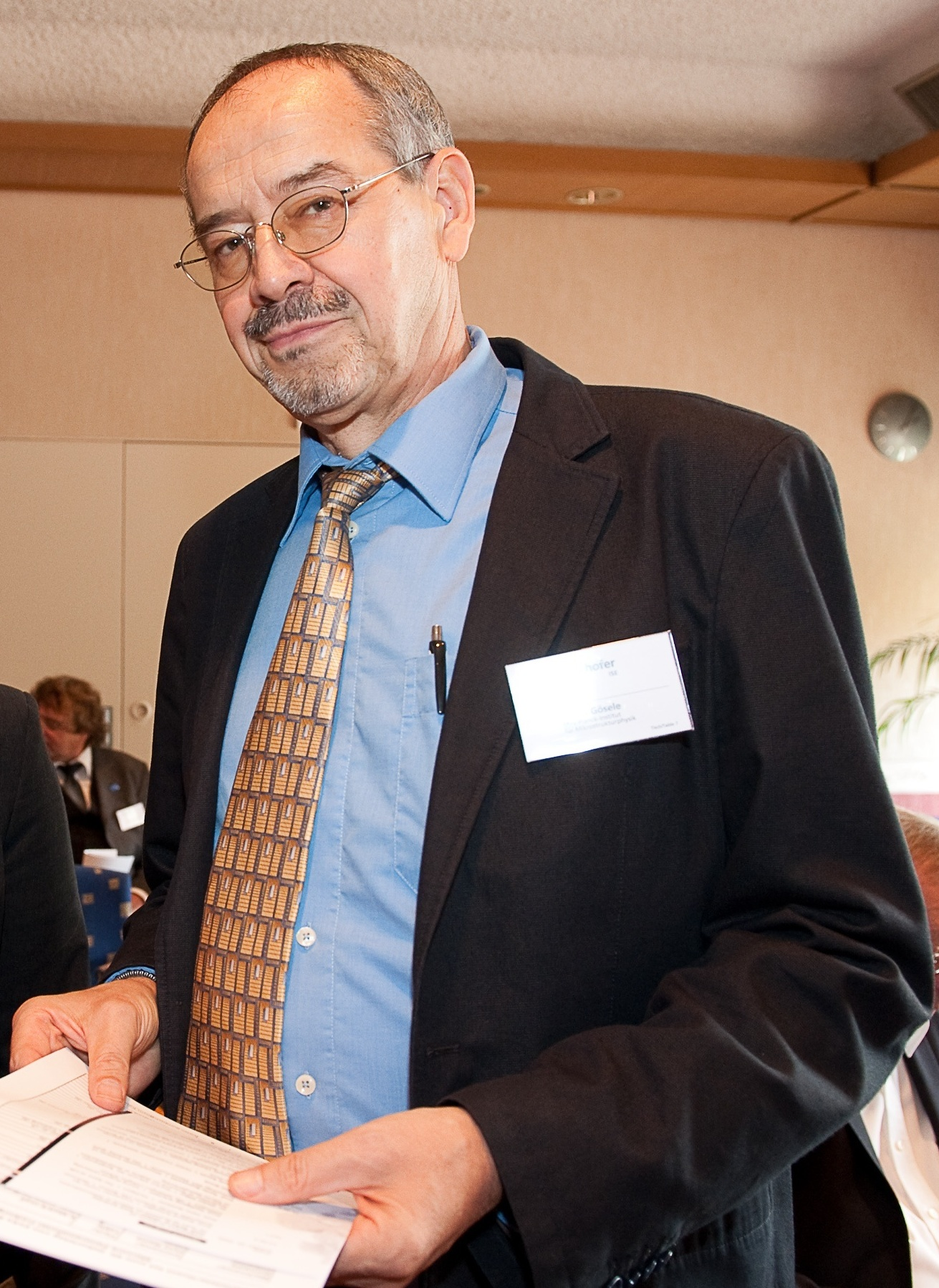 Ulrich Goesele